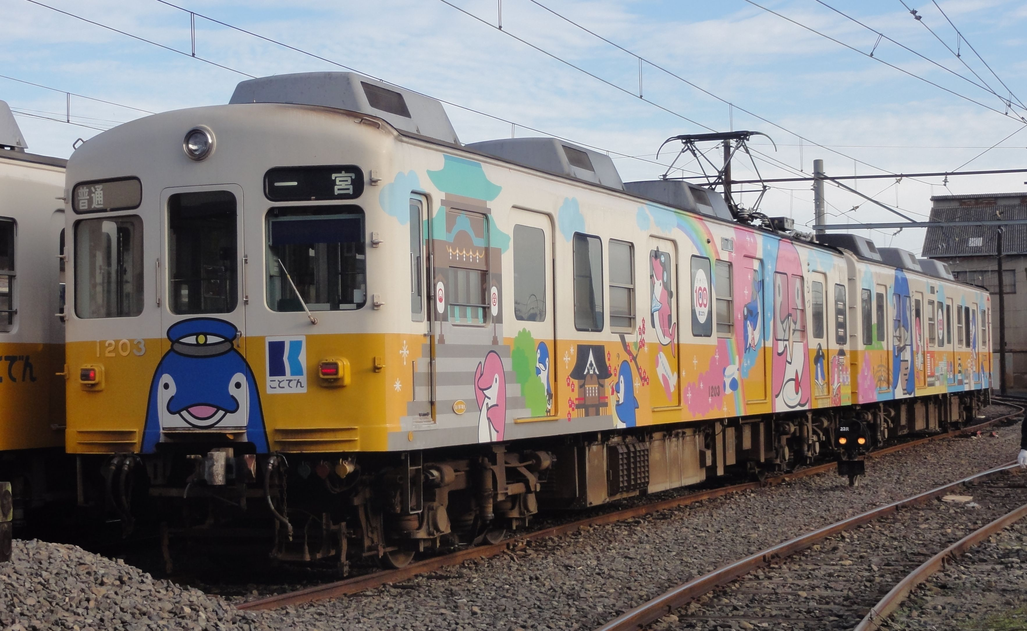 高松琴平電気鉄道1200形電車 1203編成 ことでん開業100周年記念ラッピング電車「ことちゃんひやく号」